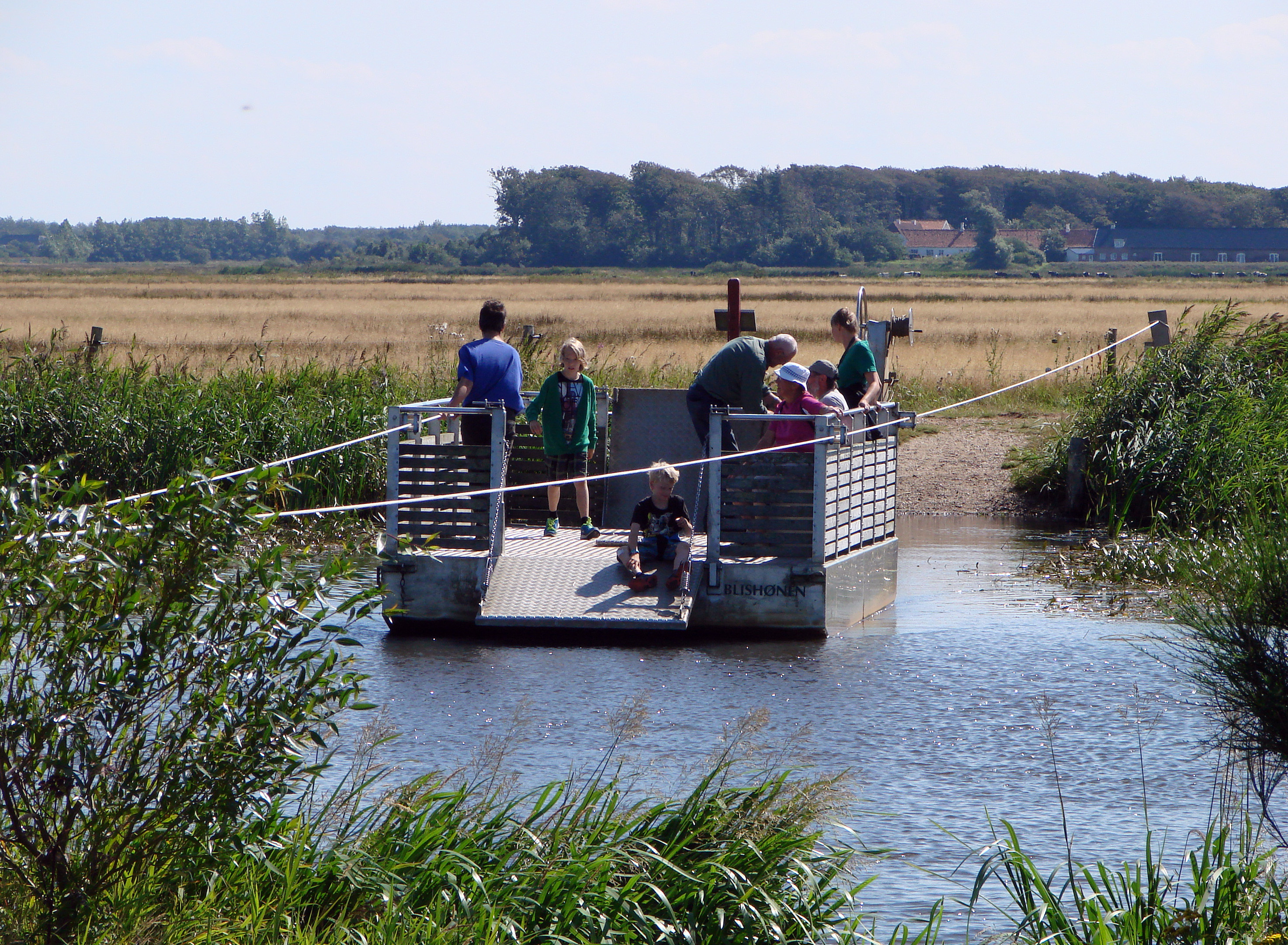 Trækfærge i Skjern Enge